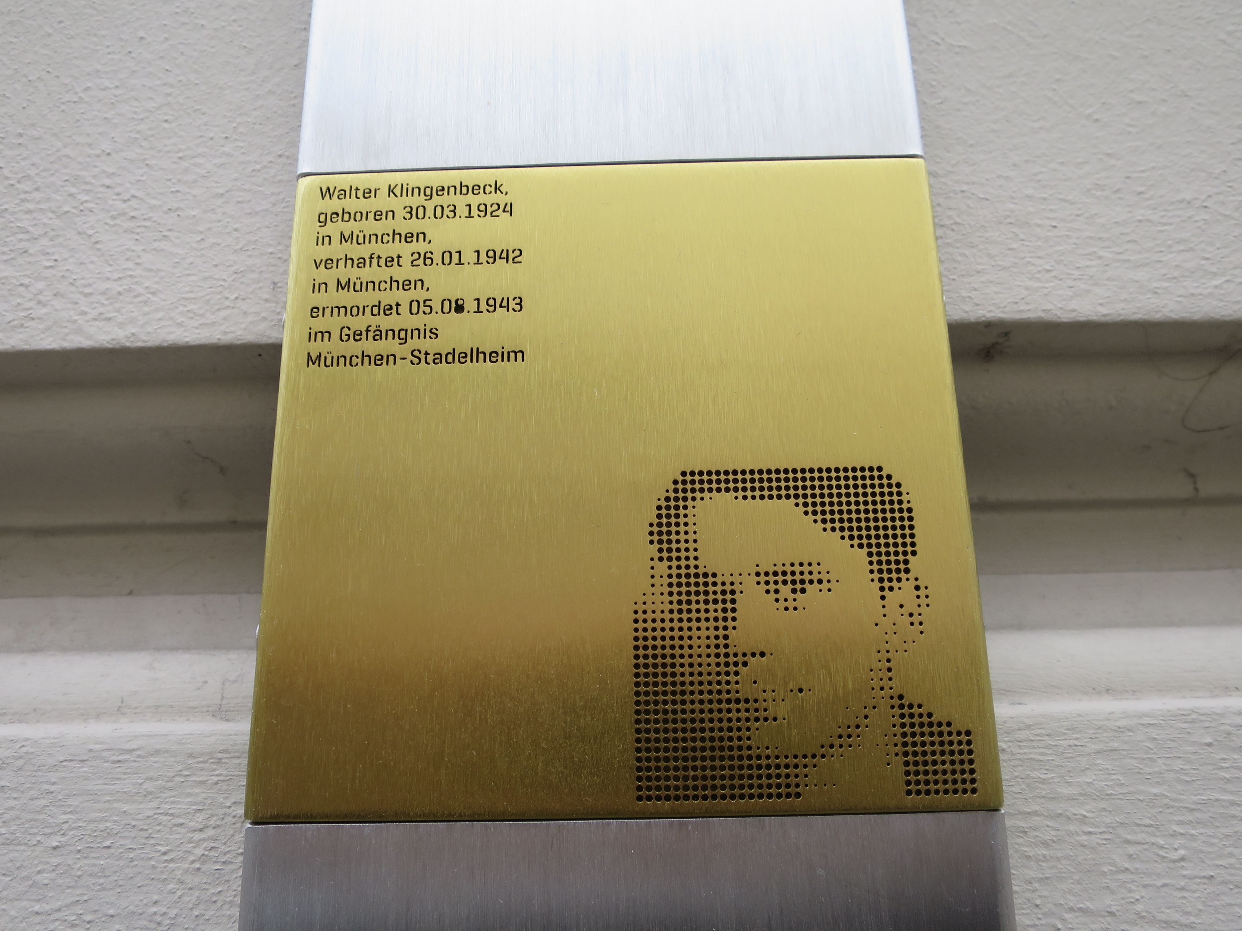 Erinnerungszeichen an Walter Klingenbeck, der mit 19 Jahren von der NS in Stadelheim hingerichtet wurde.